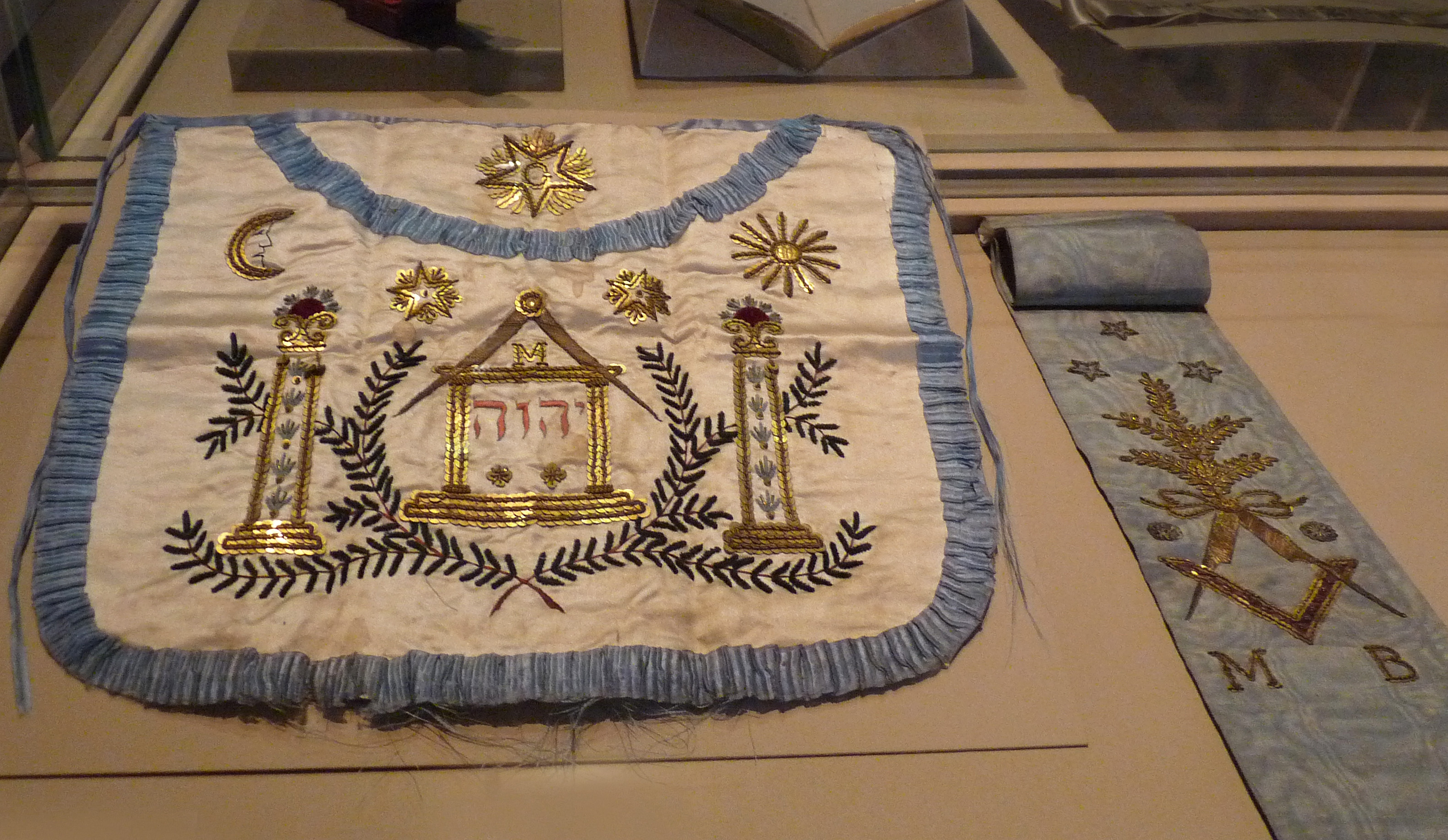 Tablier brodé et cordon de maître franc-maçon de Jean Macé (exposition temporaire au Musée historique de Strasbourg, prêt de la mairie de Beblenheim).